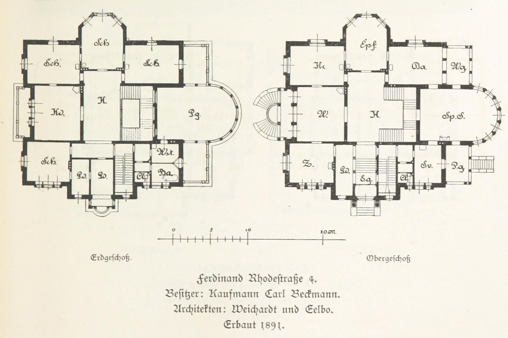 Villa Karl Beckmann in der Ferdinand-Rhode-Straße 4 in Leipzig - Grundrisse Erdgeschoss und Obergeschoss